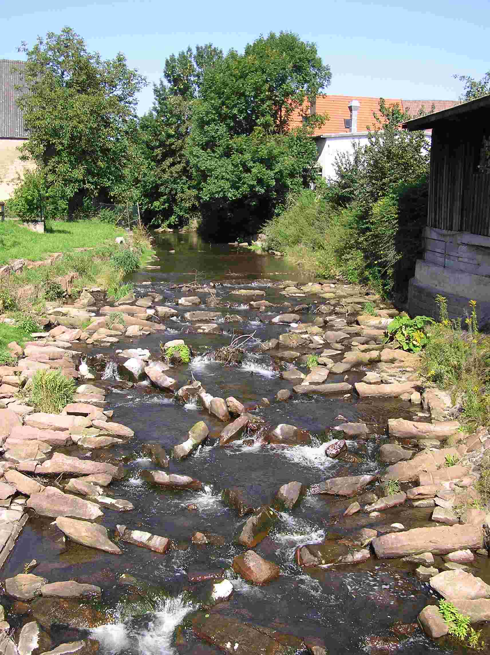 Elz (Odenwald) in Dallau